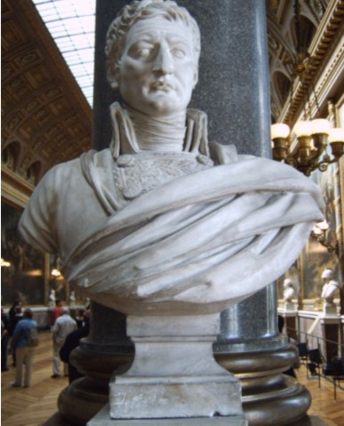 buste de Louis Marie Joseph Maximilien Gaffarelli Dufalga dans la galerie des batailles du château de Versailles